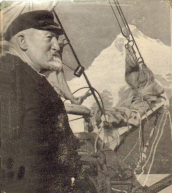 Albert Pagels med pipa i mun på båt. Omslag till hans bok Mein Leben.